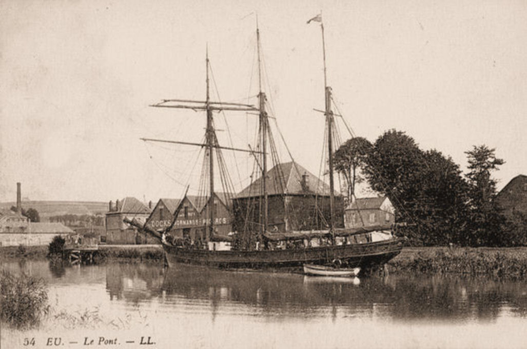 Le port d'Eu sur la Bresle au début du XXème siècle (carte n°54)